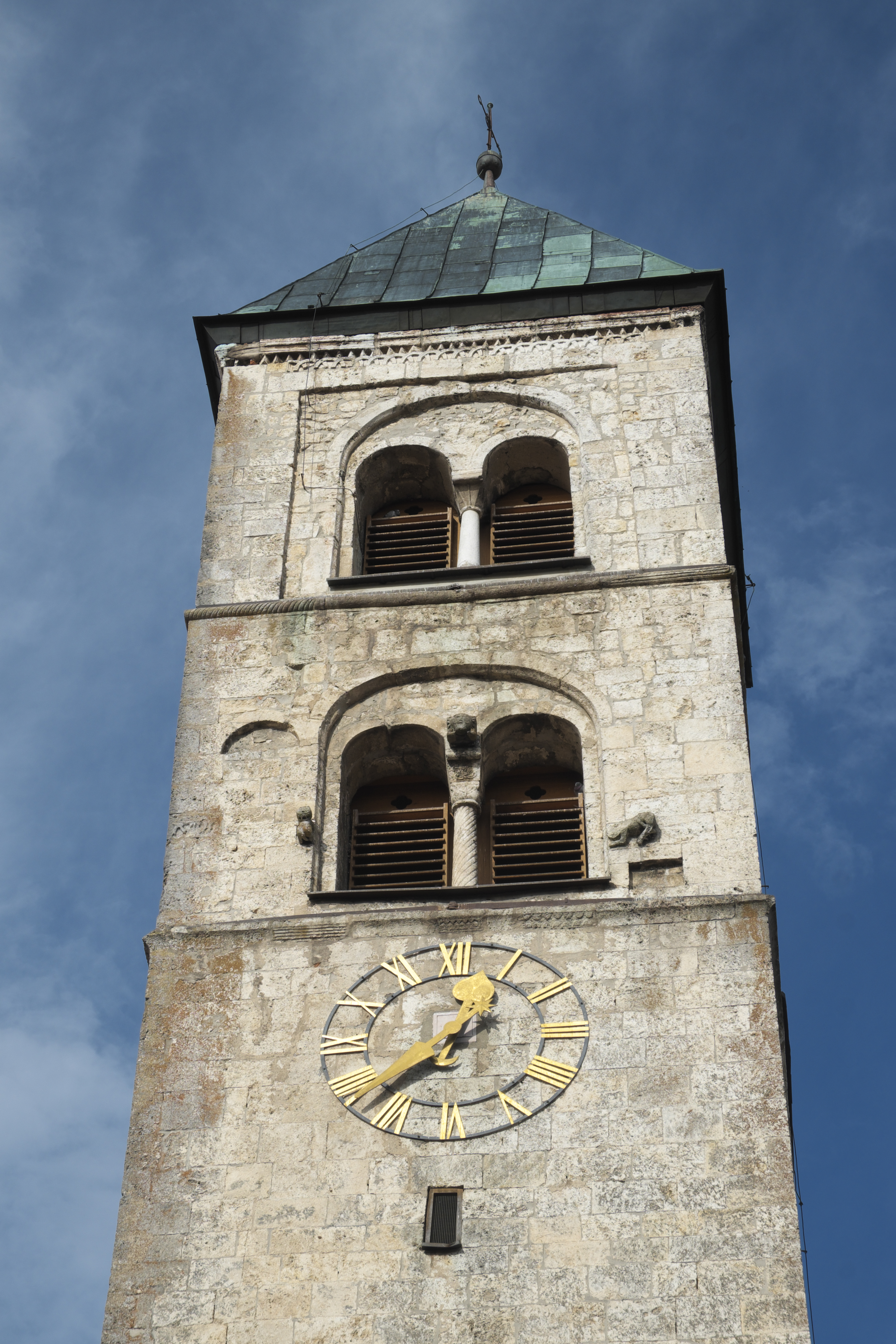 Katholische Pfarrkirche Maria Immaculata in Biburg im niederbayerischen Landkreis Kelheim (Bayern/Deutschland), Südturm